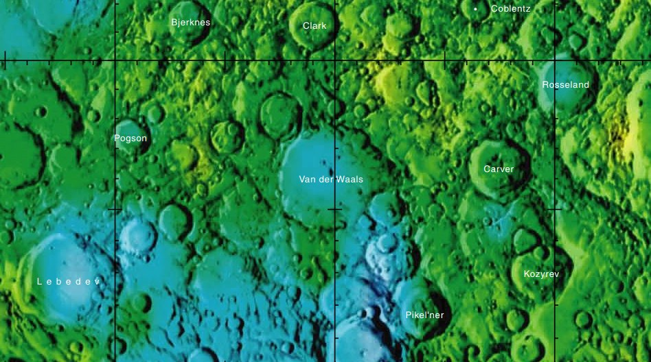 Cráter lunar Van der Waals. Localización. (Imagen cartográfica LRO)